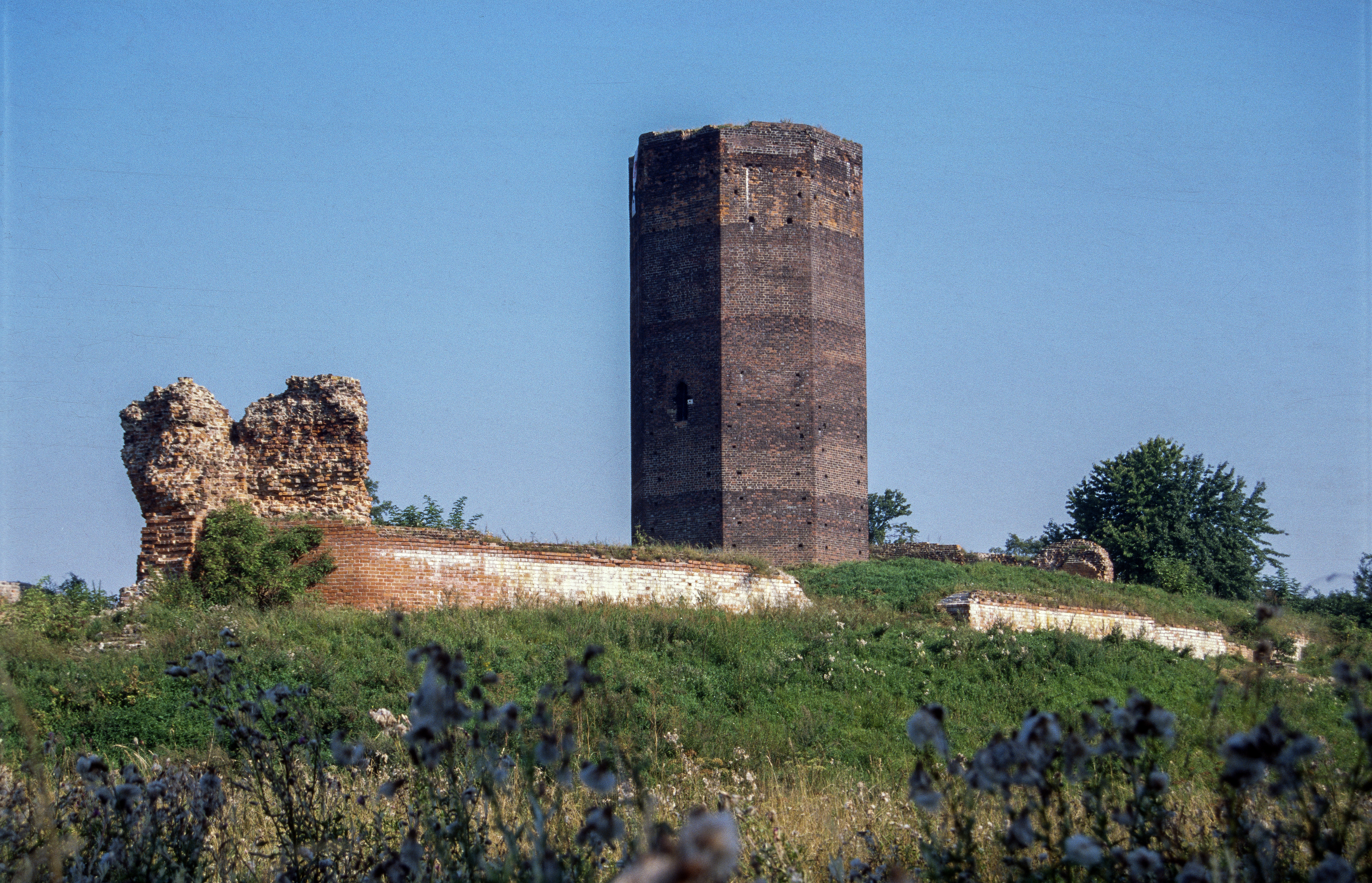 nr 1/AK-I-11a/5/33 z 09.02.1933; 378/XIV-60 z 21.12.1946; 120/320 z 30.12.1967)